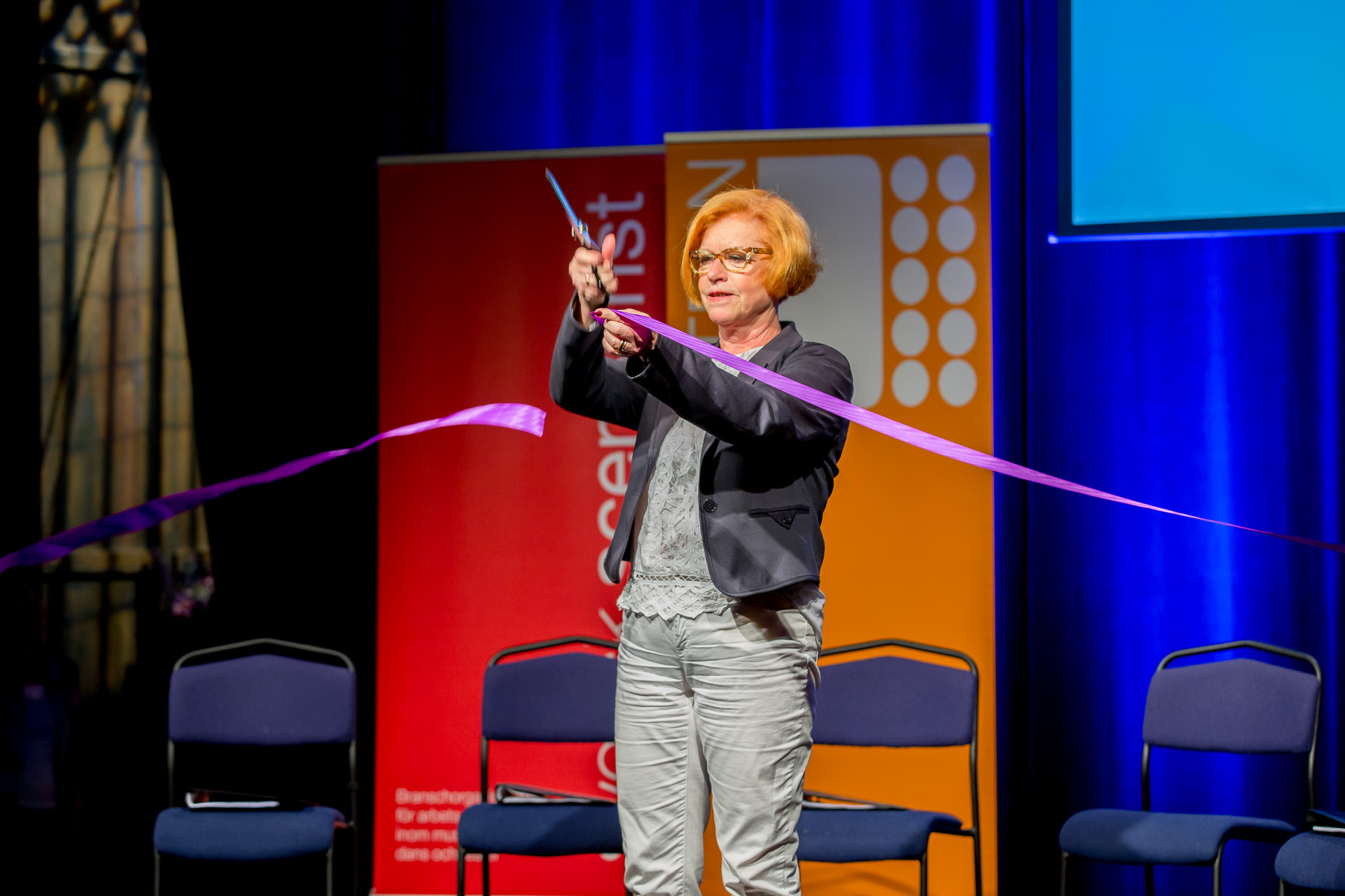 Gotlands landshövding Cecilia Schelin Seidegård inviger Årets kultur i Almedalen.